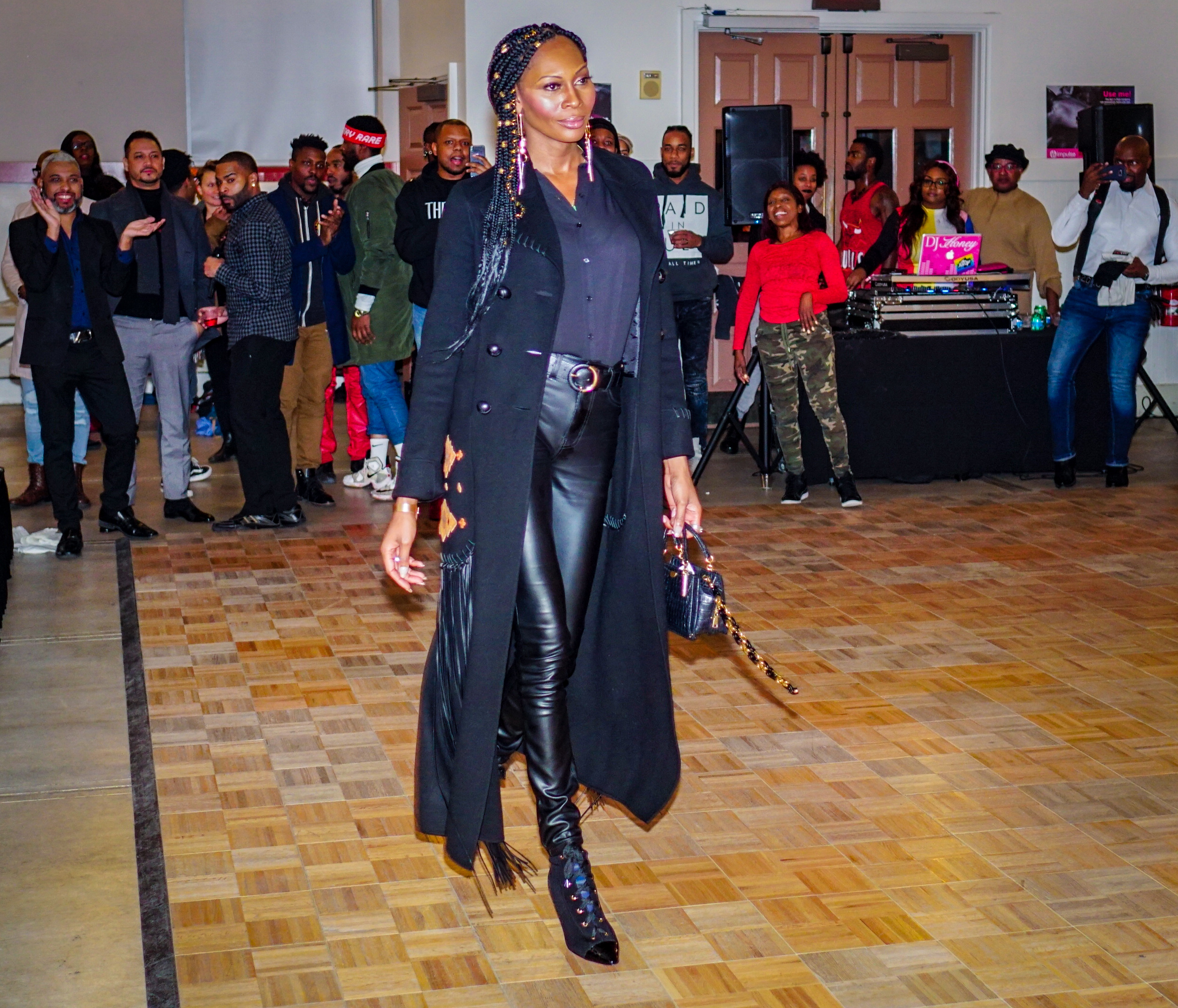 Special guest Dominique Jackson from Pose FX